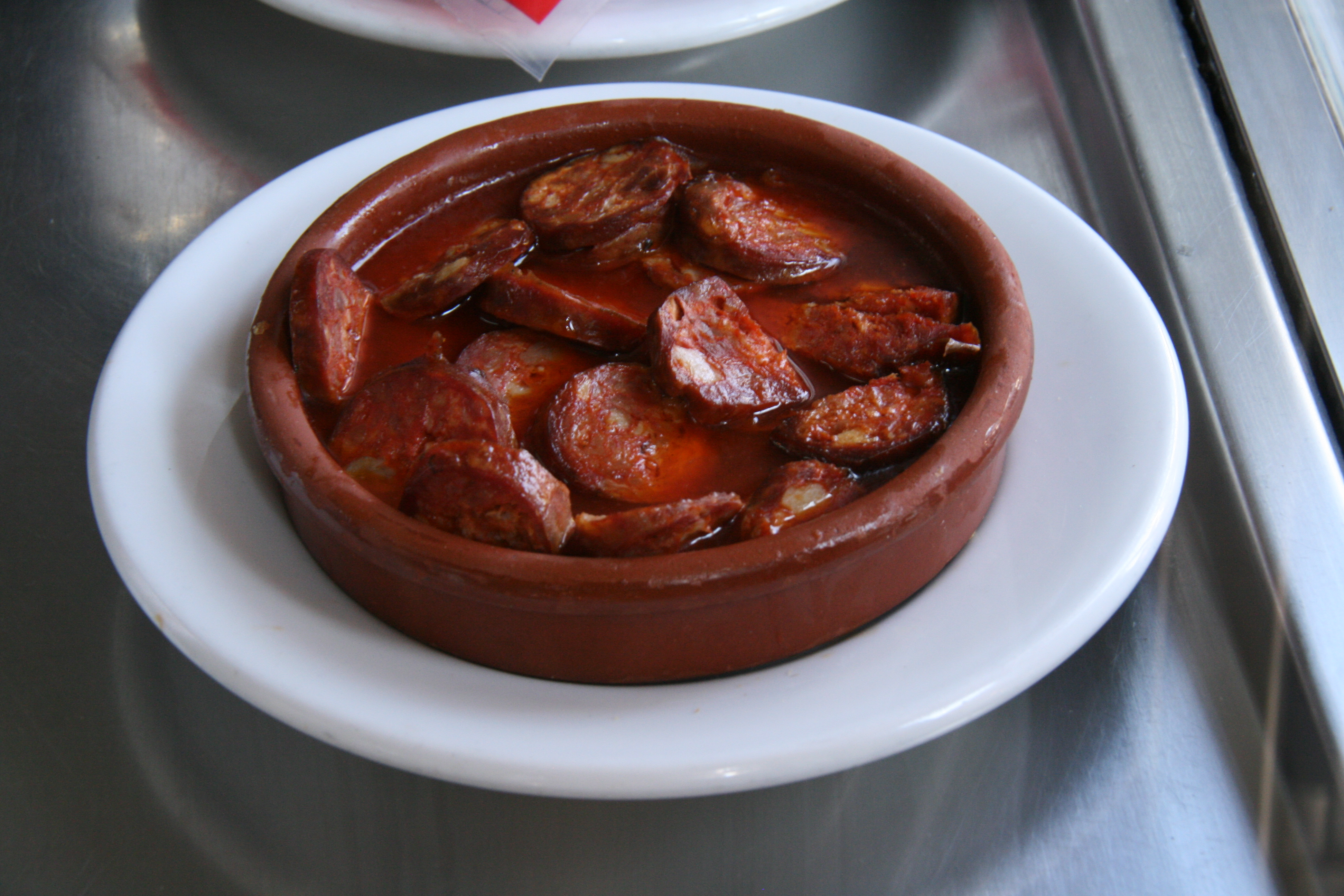 Cazuela de chorizo - picante